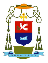 유수일 F.하비에르 주교 문장